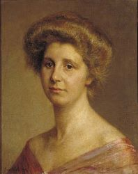 Portret of Dutch composer Rosy Wertheim